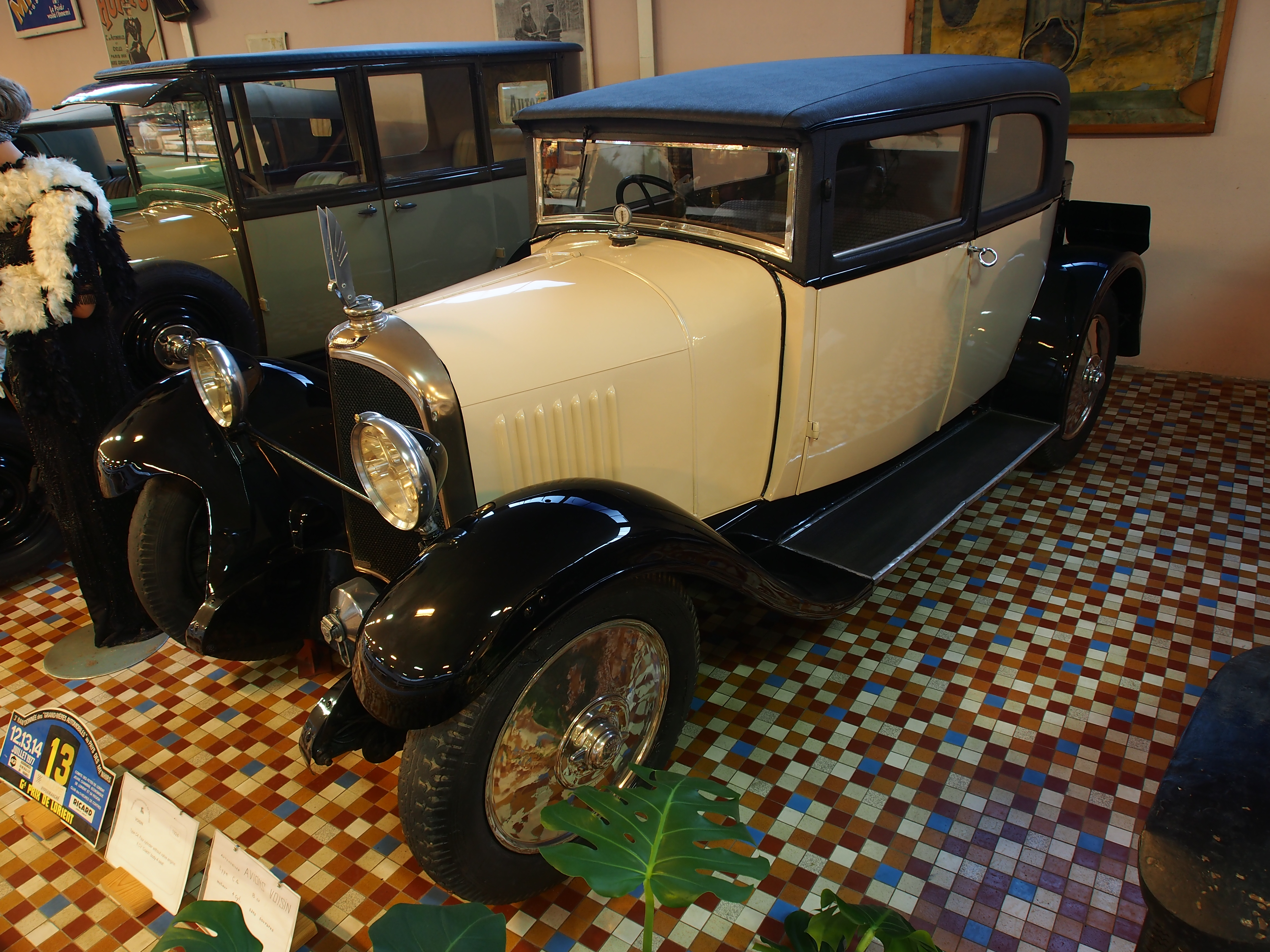 Photographed at the Musée Automobile de Vendée, France.